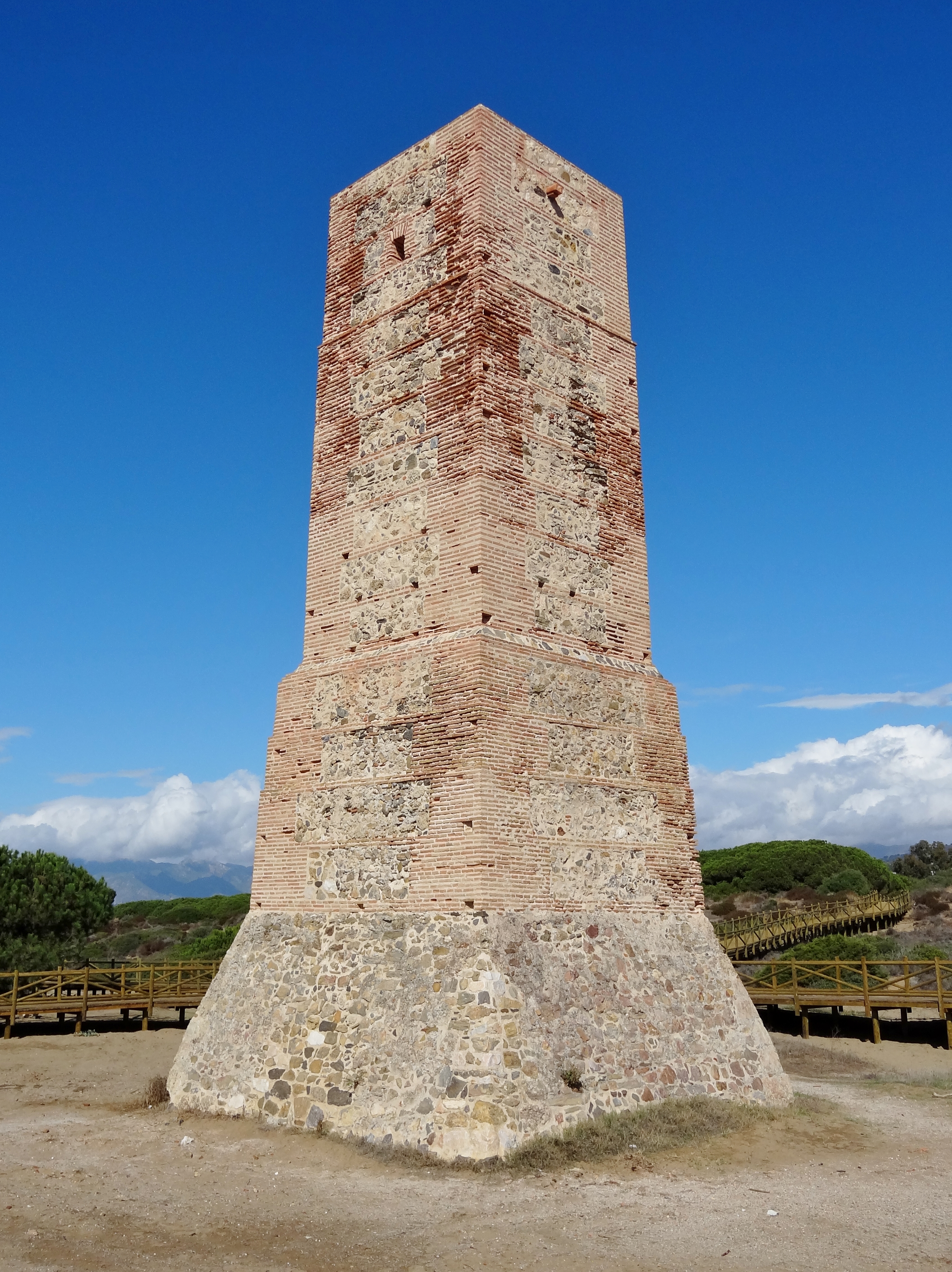 Torre Ladrones (‚Turm der Diebe‘) in Cabopino, Gemeinde Marbella, Provinz Málaga, Spanien